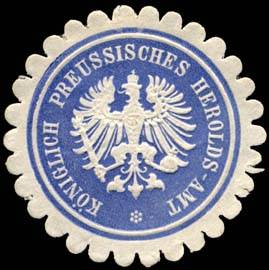 Sealing stamp Title: Königlich Preussisches Heroldsamt (Heraldik) Description: Herolds - Amt, Adel, Wappen, blau, weiß, geprägt Place: Berlin size: 3 cm